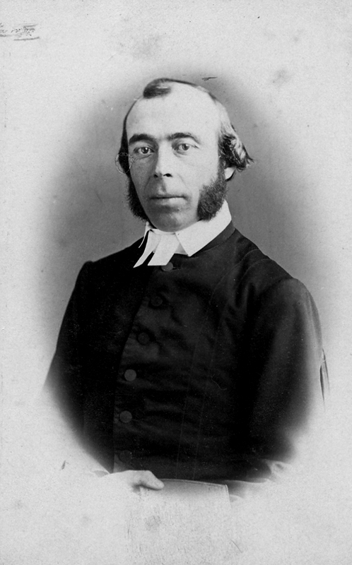 Biskop Charleville i Linköping såsom teol. lektor i Örebro.